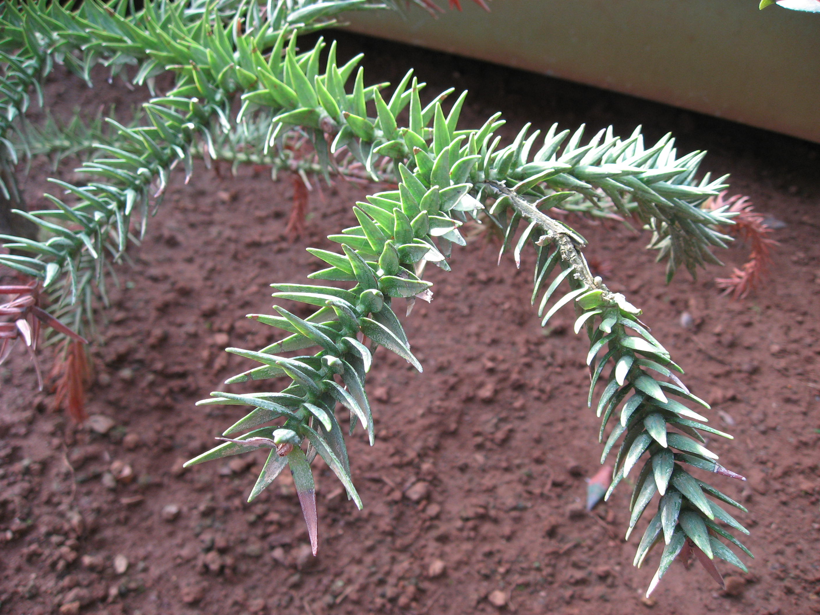 Araucaria montana in Serres d'Auteuil Map: 48° 50' 49" N 2° 15' 8" E